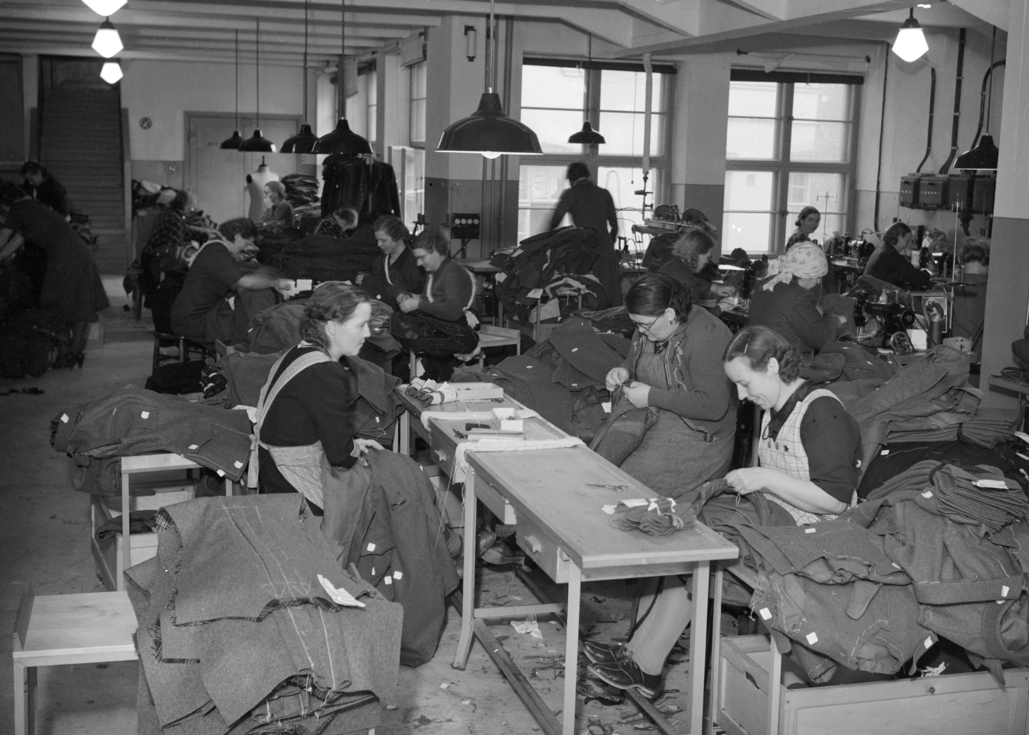 Varusteiden valmistusta Tampereen Pukutehtaassa Tuomiokirkonkadulla. Kuva on talvisodan ajalta.